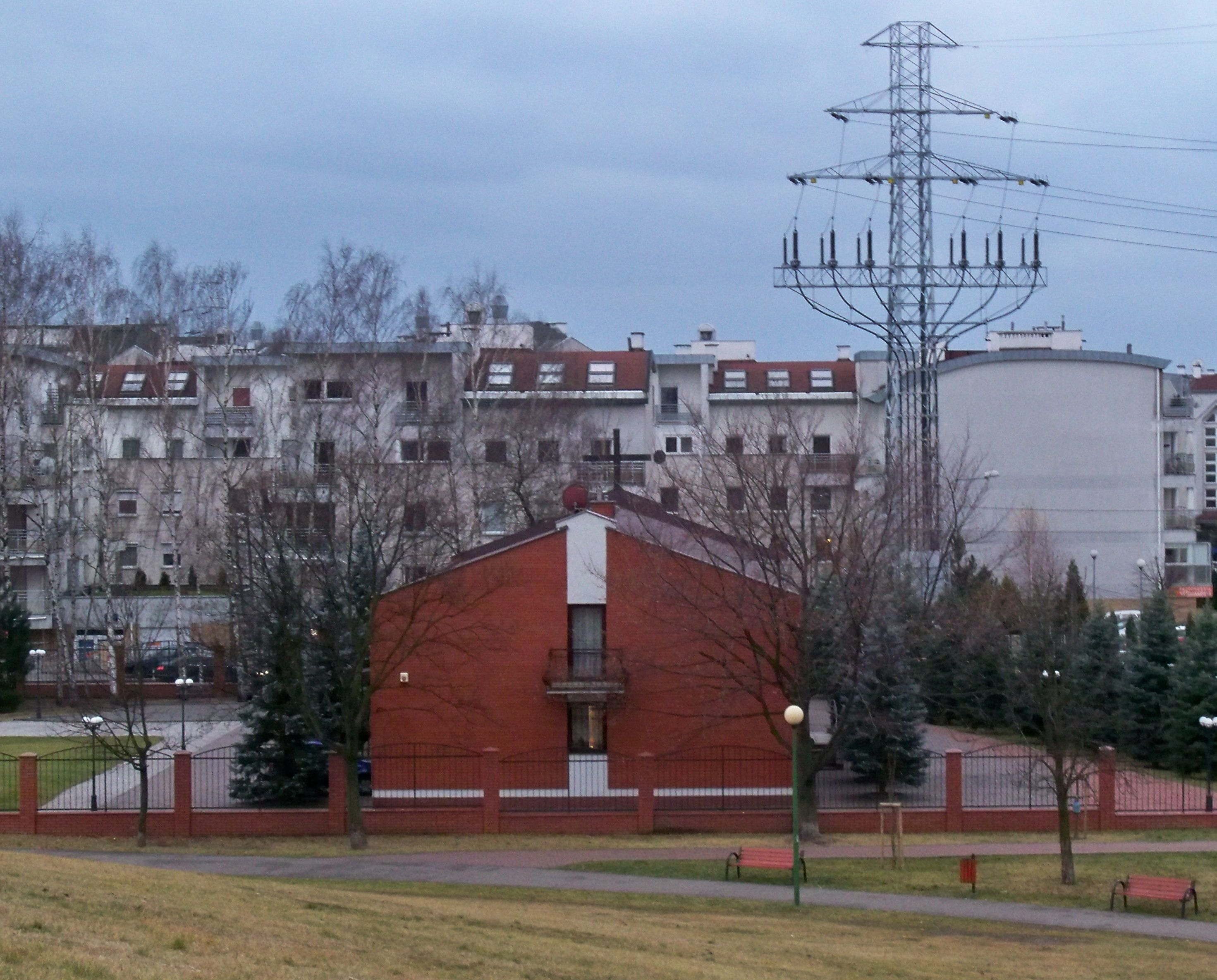 Kościół pw. św. Grzegorza Wielkiego na Szczęśliwicach w Warszawie (ul. Włodarzewska 54). Stan z pierwszych dekad XXI w. Widok z Kopca Szczęśliwickiego, w tle zabudowa osiedlowa ulicy Włodarzewskiej.